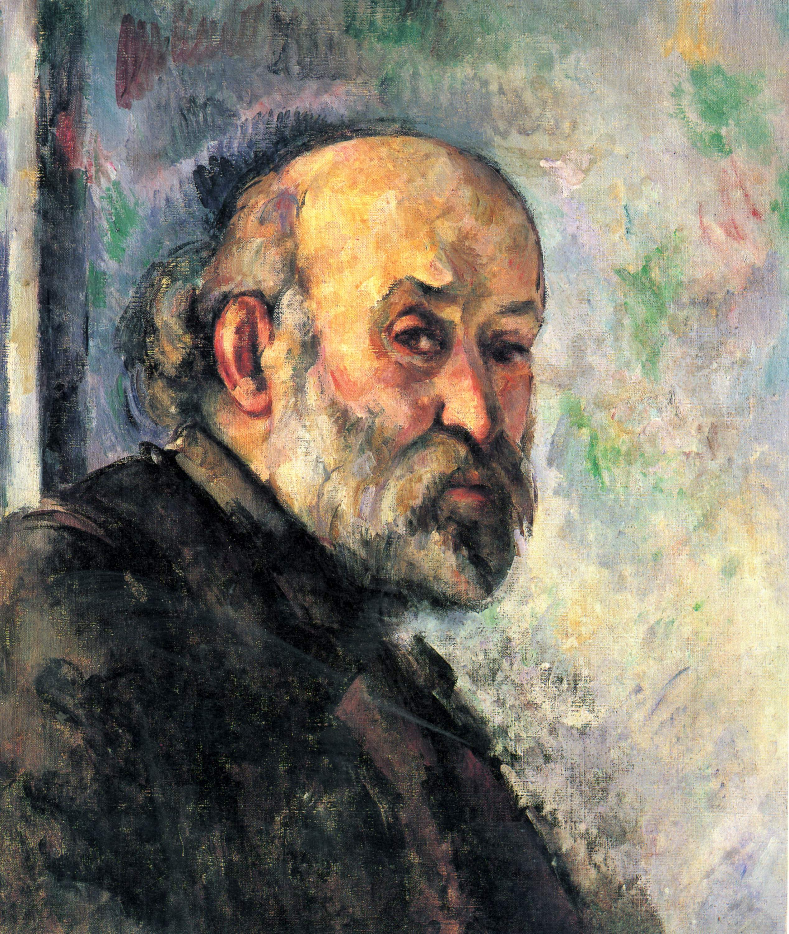 Selbstporträt